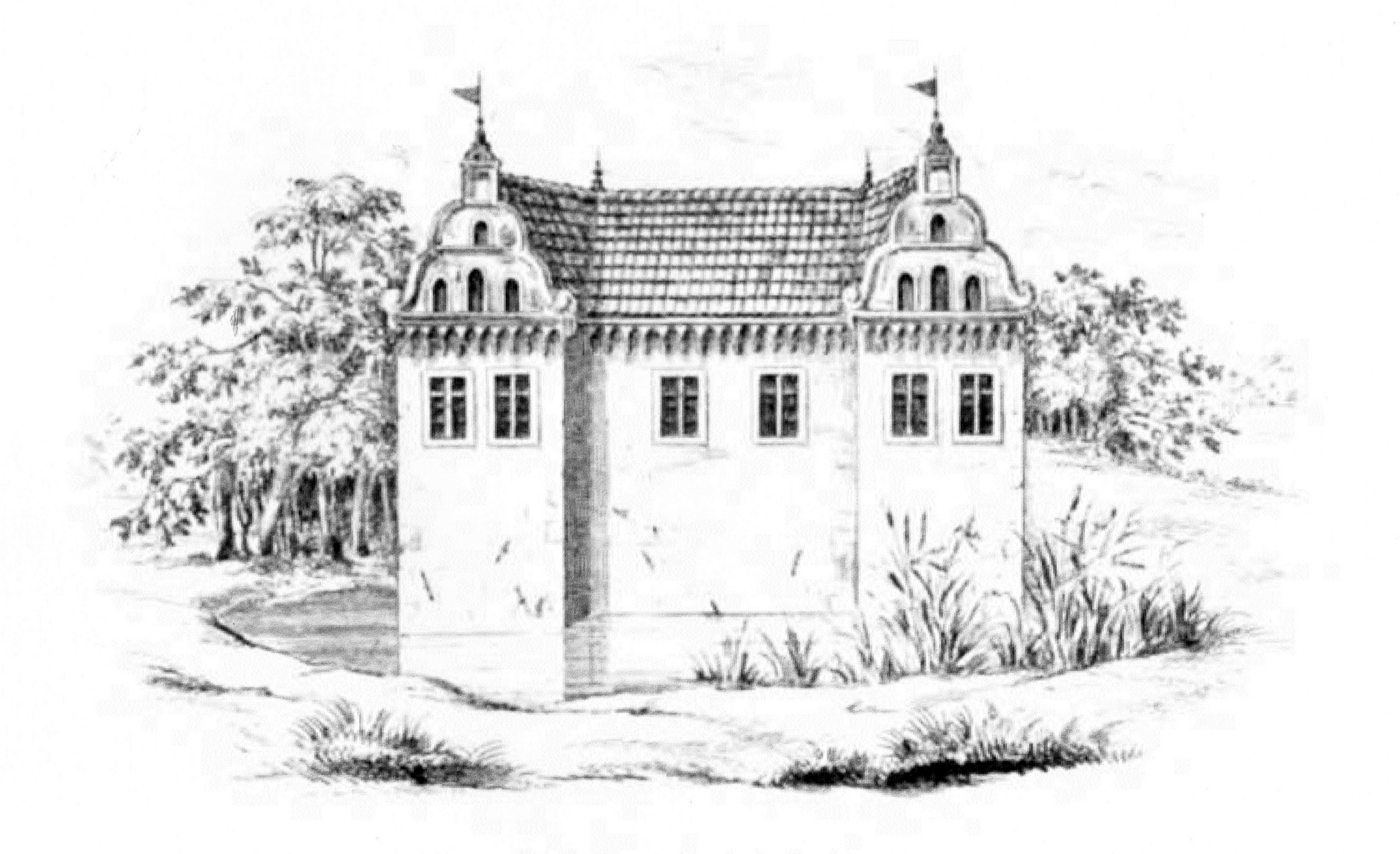 Gut Gruntorf (auch: Grünhof oder Lundsgaart) aus der zweiten Hälfte des 16. Jahrhunderts , Zeichnung von Köhler und Roisternitz 1862